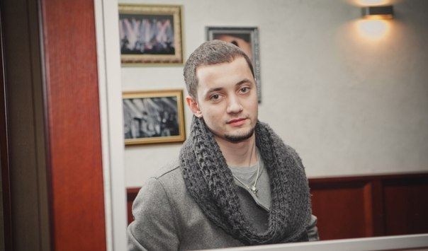 Стас Шуринс